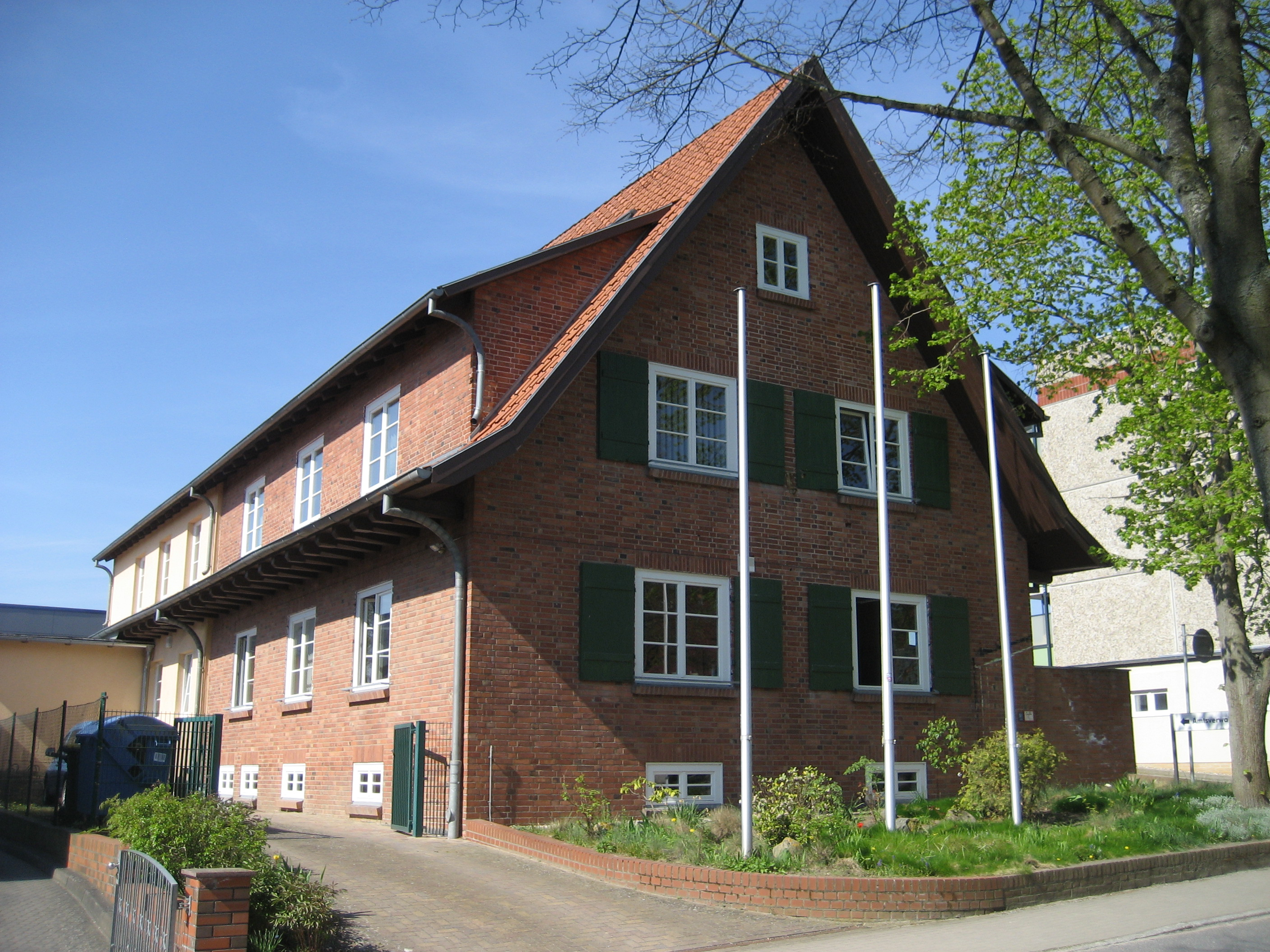 Das Gebäude des Amtes Mecklenburgische Schweiz in der Von-Pentz-Allee in Teterow.